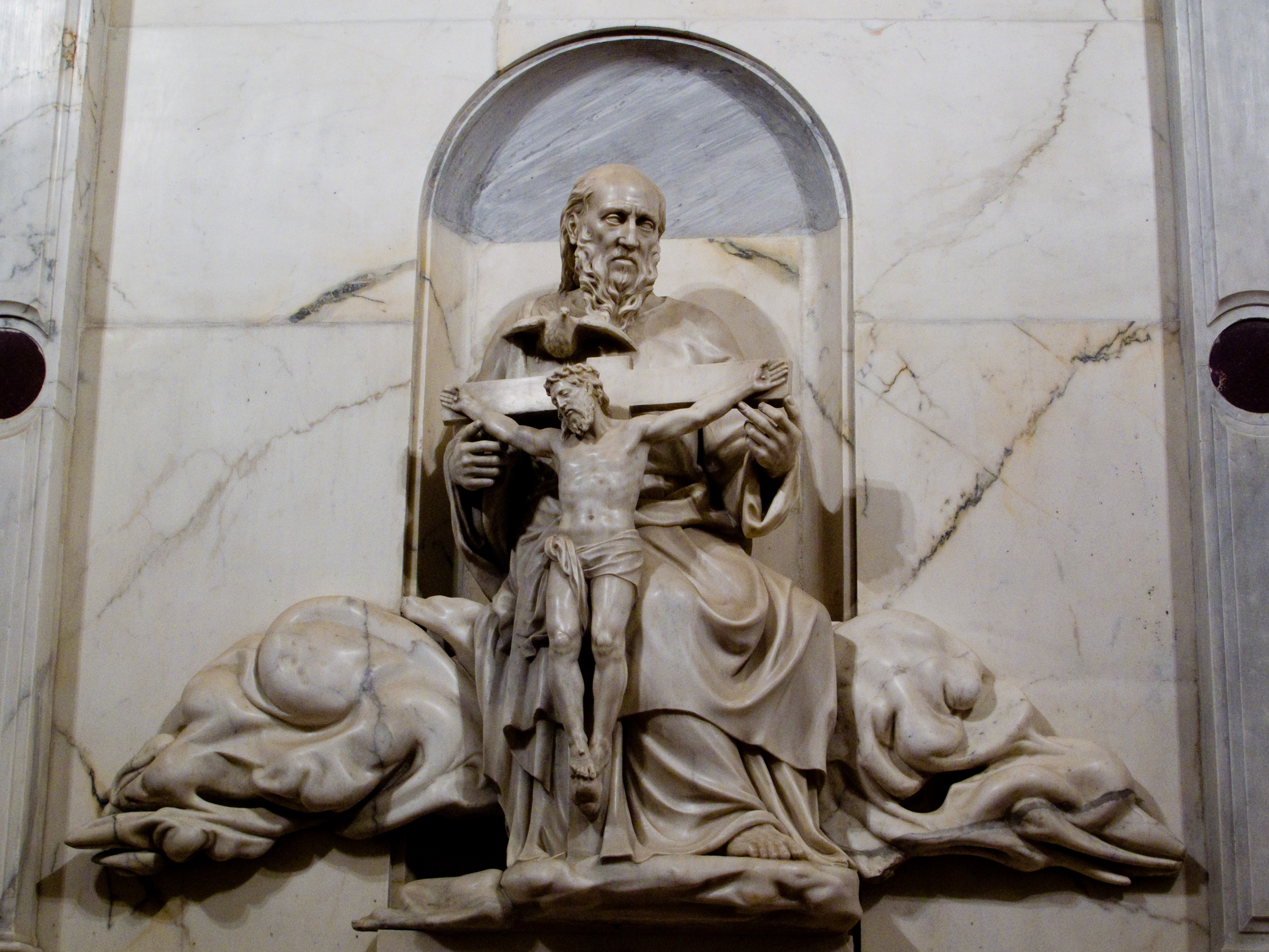 Vicenza - Chiesa di Santa Corona - Altare Nievo